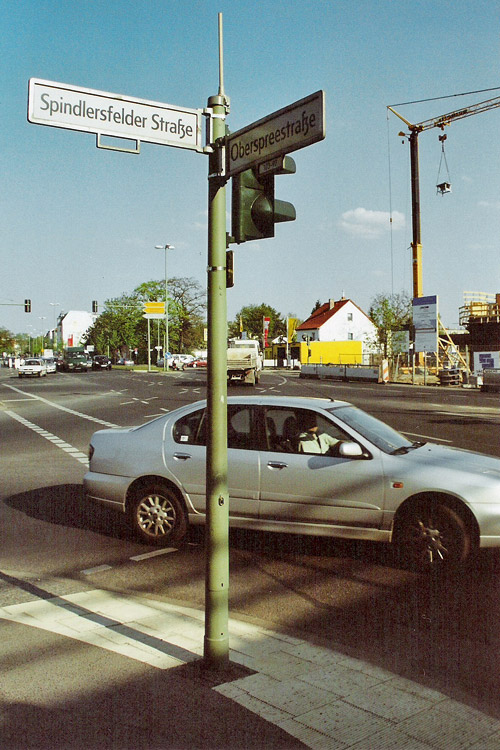 Kreuzung Spindlersfelder Straße/Oberspreestraße. Hier wird voraussichtlich 2007 die Schnellstraße über eine Brücke zum Glienicker Weg führen.